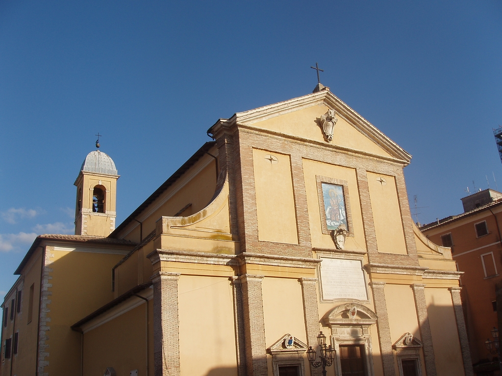 Duomo di Monterotondo, provincia di Roma